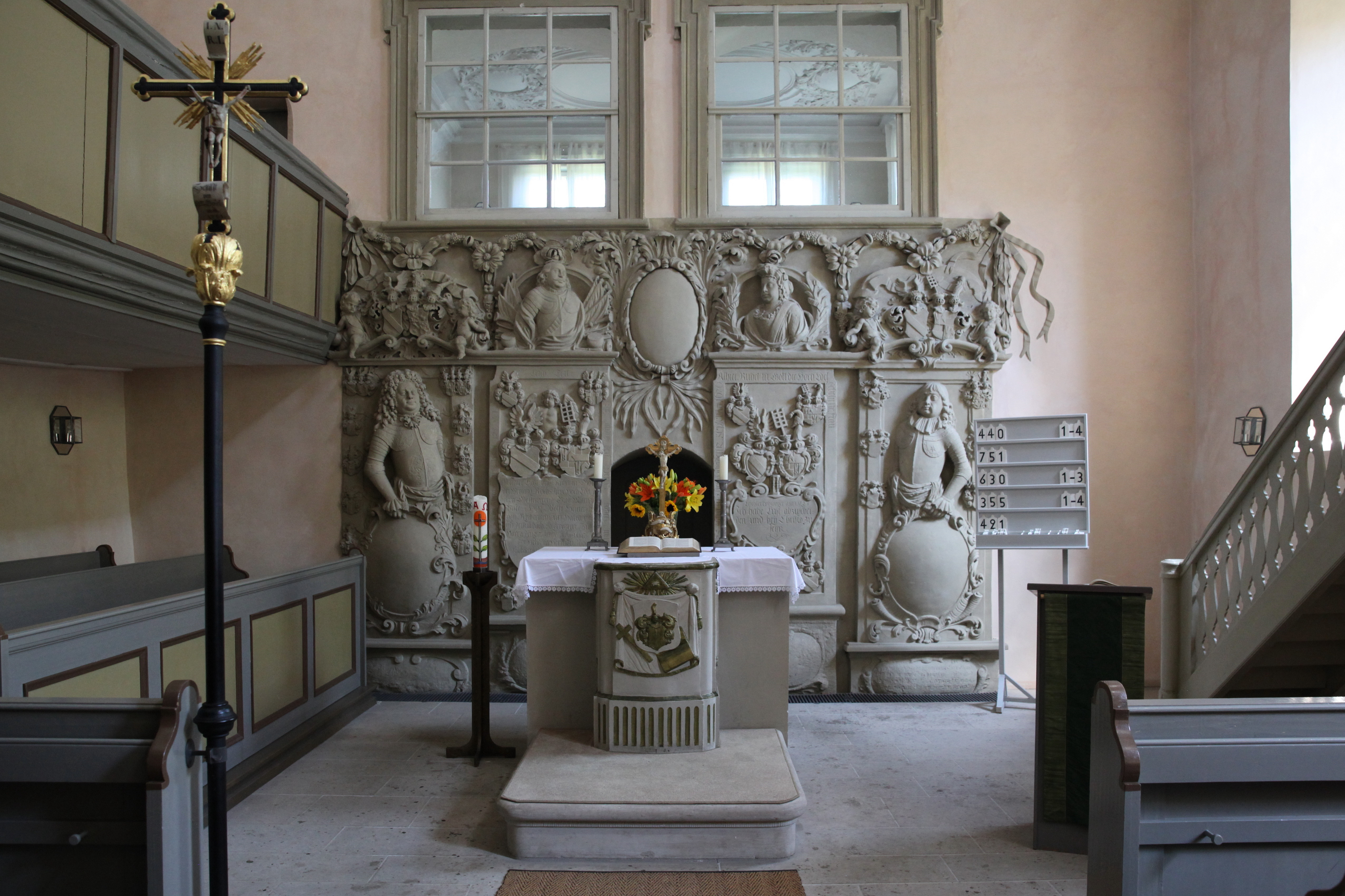 Schloßkirche in Niederfüllbach